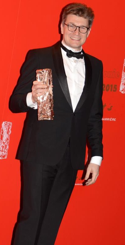 David Rosier à la cérémonie des César